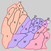 後の福岡県築上郡域の町村制時点の町村。